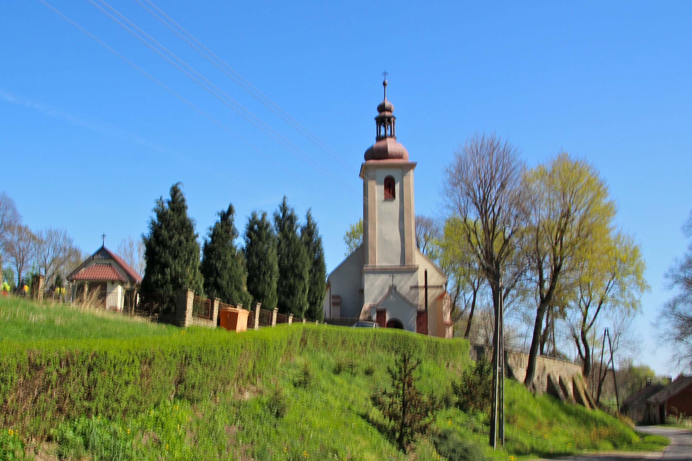 Krasne Pole - kościół filialny p.w. św. Marii Magdaleny, 1691, XVIII w. (zabytek nr 1173/66 z 15.02.1966)